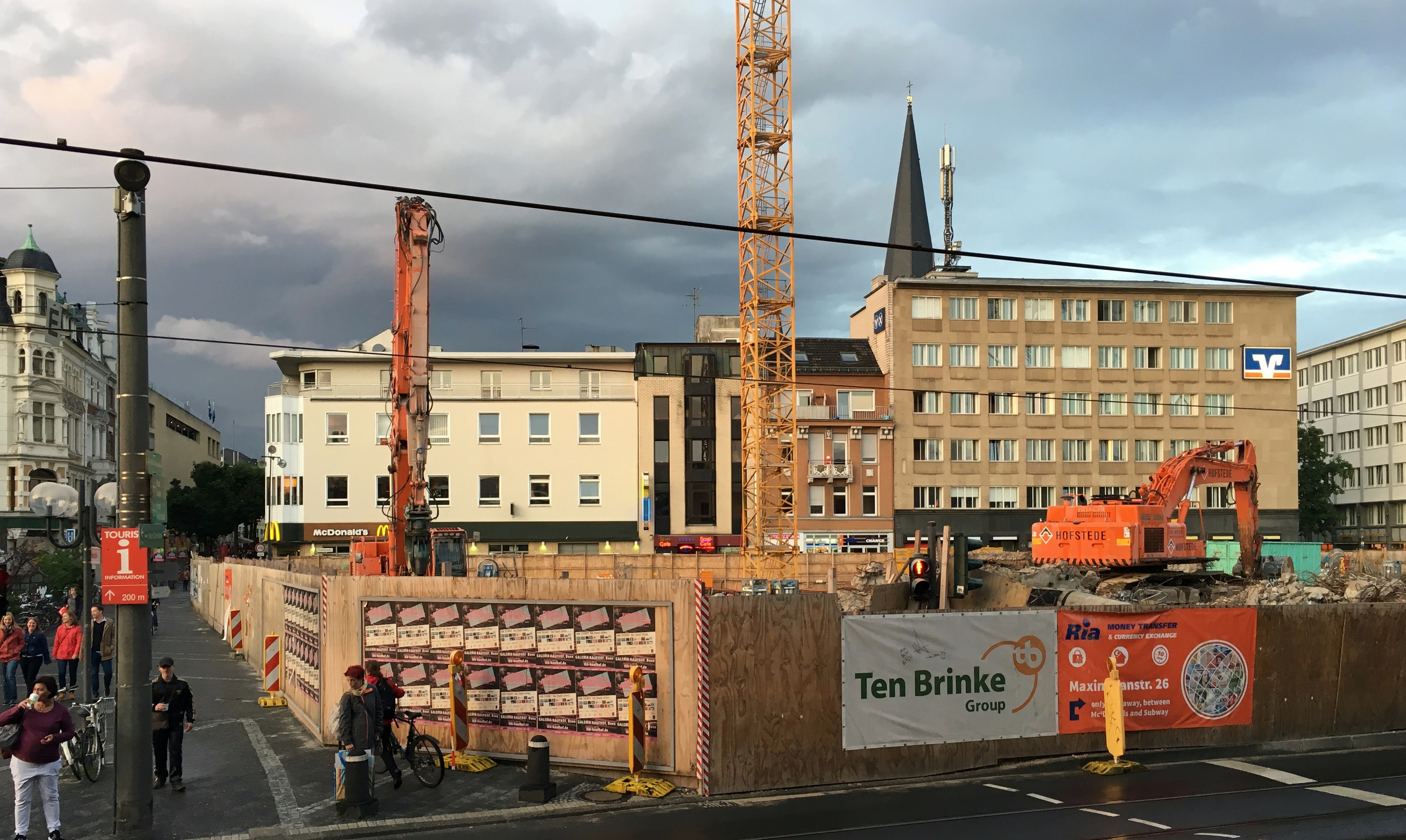 Bonn-Zentrum: Bahnhofsvorplatz, Abriss der Südüberbauung geht zu Ende.